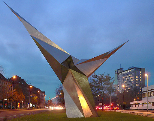 Skulptur Stahlengel in Hannover Foto aufgenommen von Benutzer Benutzer:Axel Hindemith, Dezember 2005